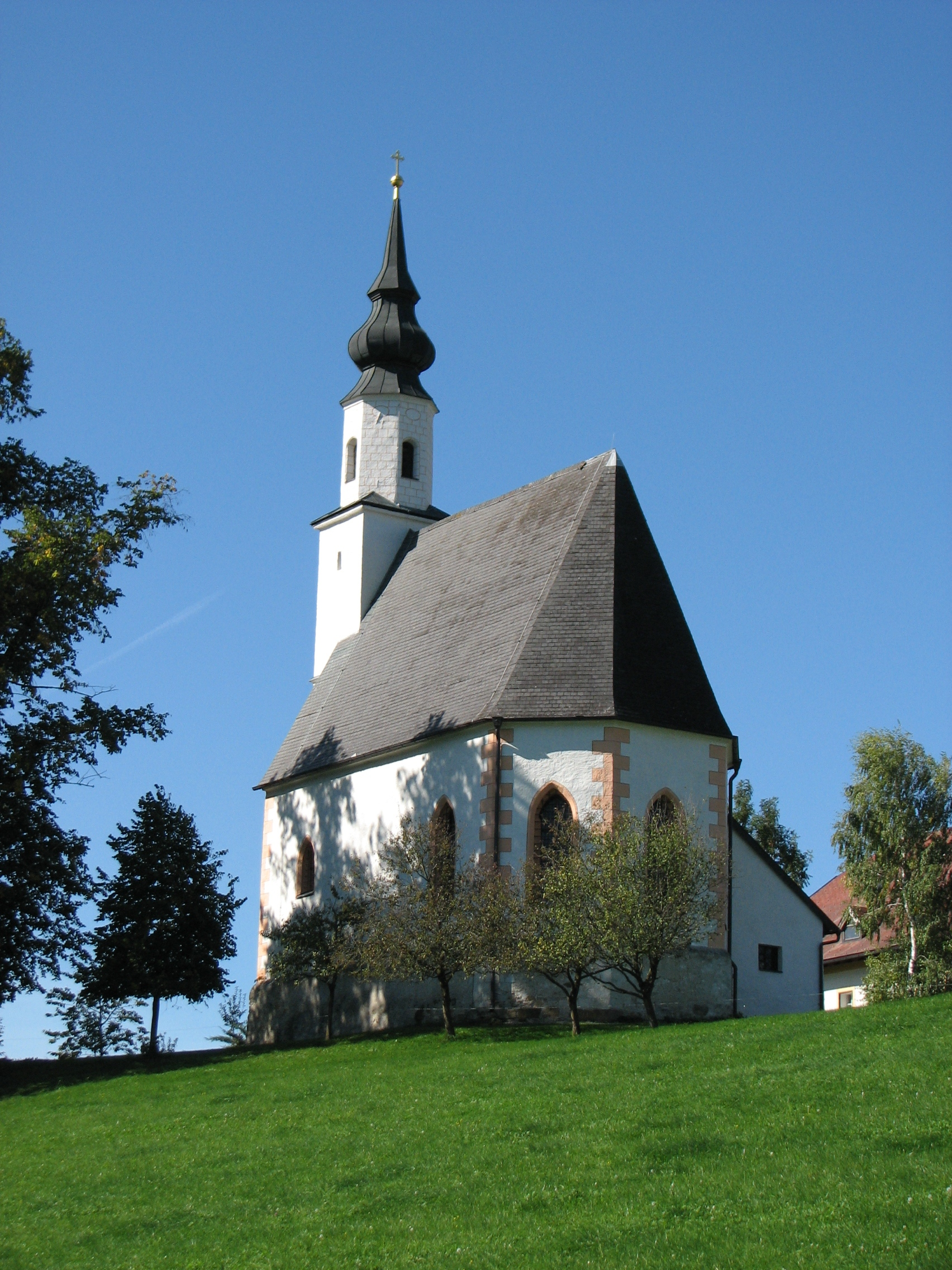 Kath. Filialkirche hl. Leonhard in Mühlberg